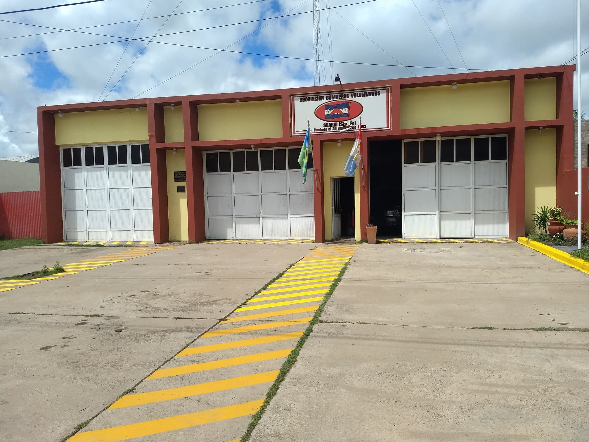 Se trata de bomberos voluntarios